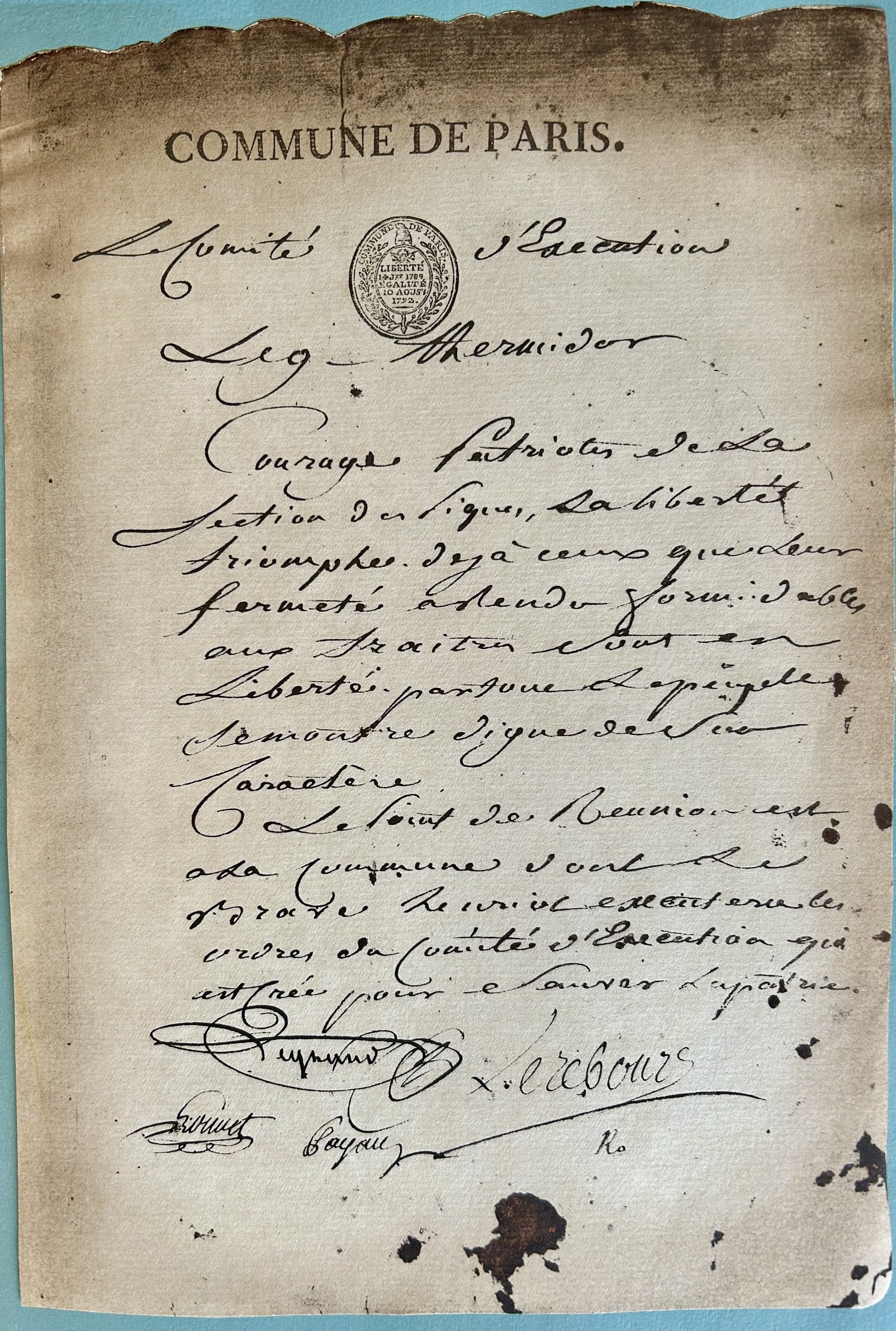 Appel de la Commune à la section des Piques le 9 thermidor an II (26 juillet 1794)signé Louvet, Payan, Lerebourgs, Legrand, Ro(bespierre). Musée Carnavalet (Paris).